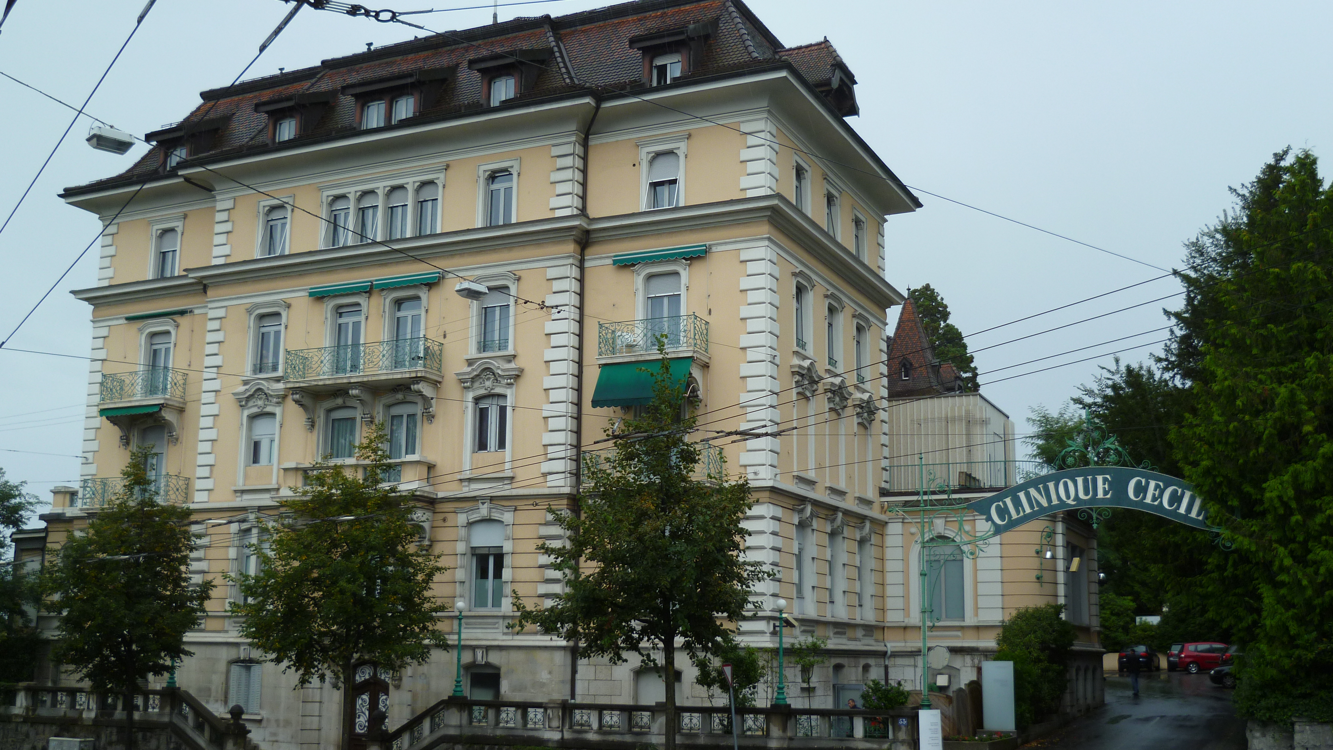 Clinique Cécile à Lausanne